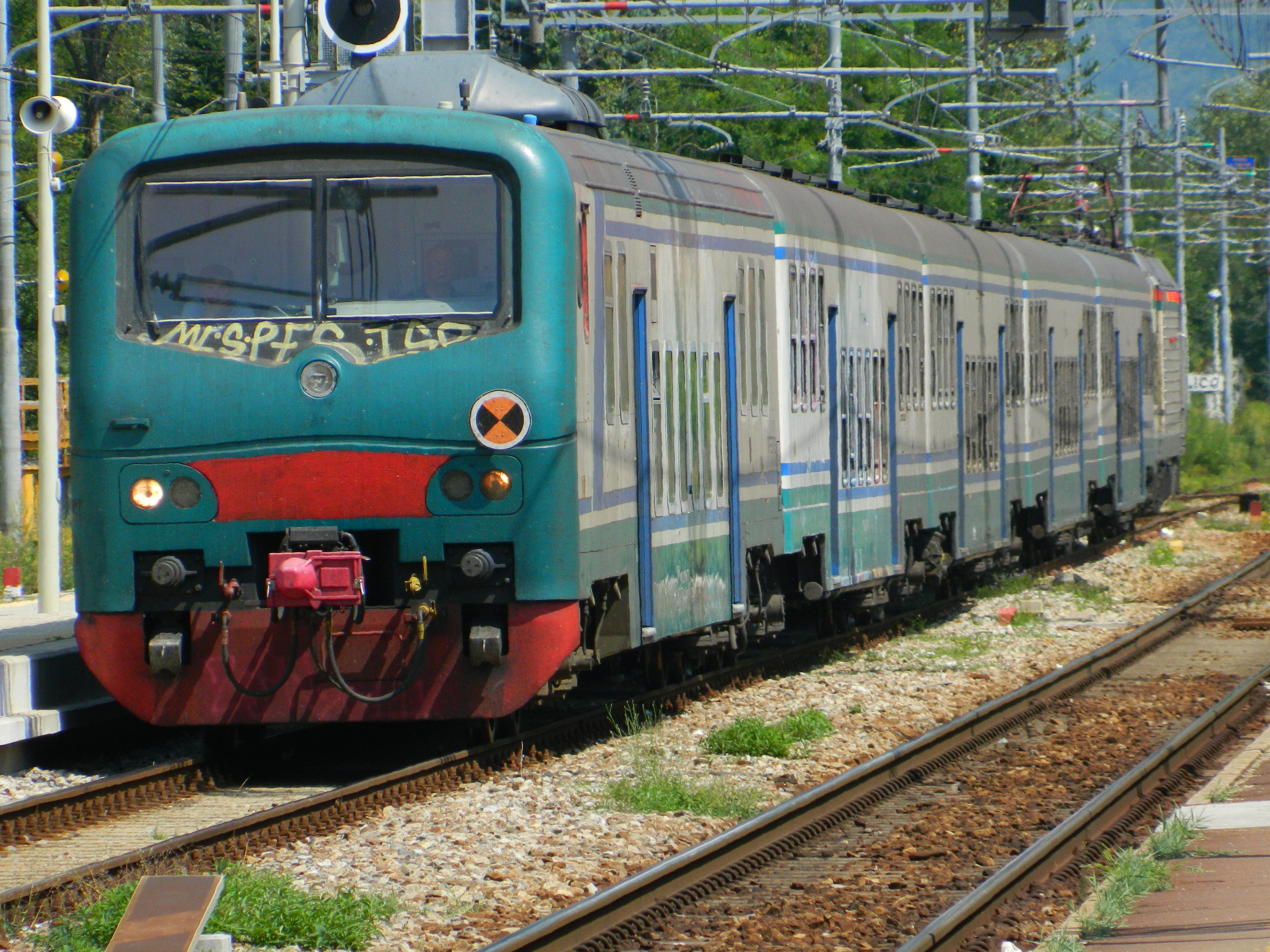 Treno regionale di Trenord in arrivo a Colico da Calolziocorte